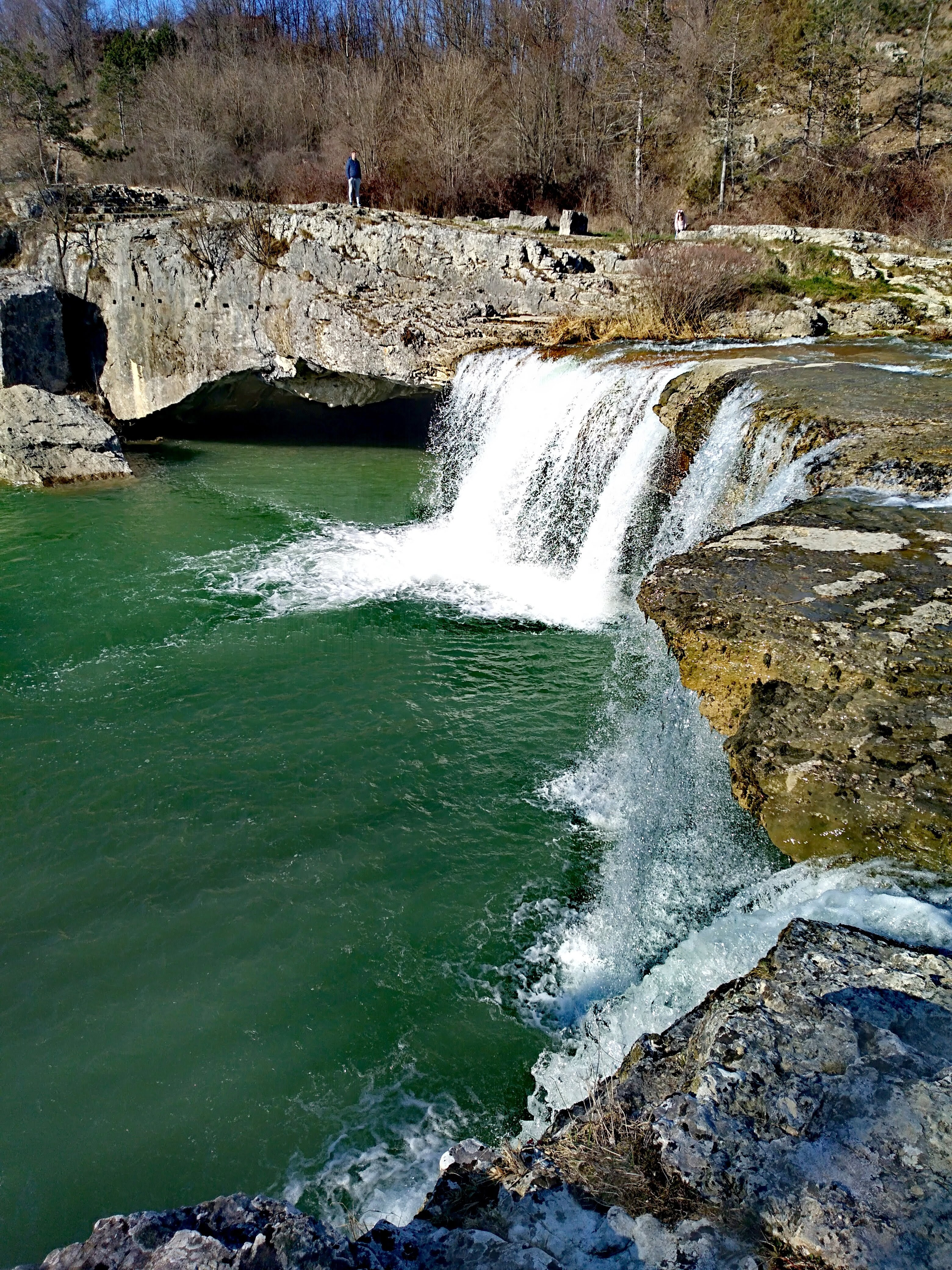 Zarečki krov